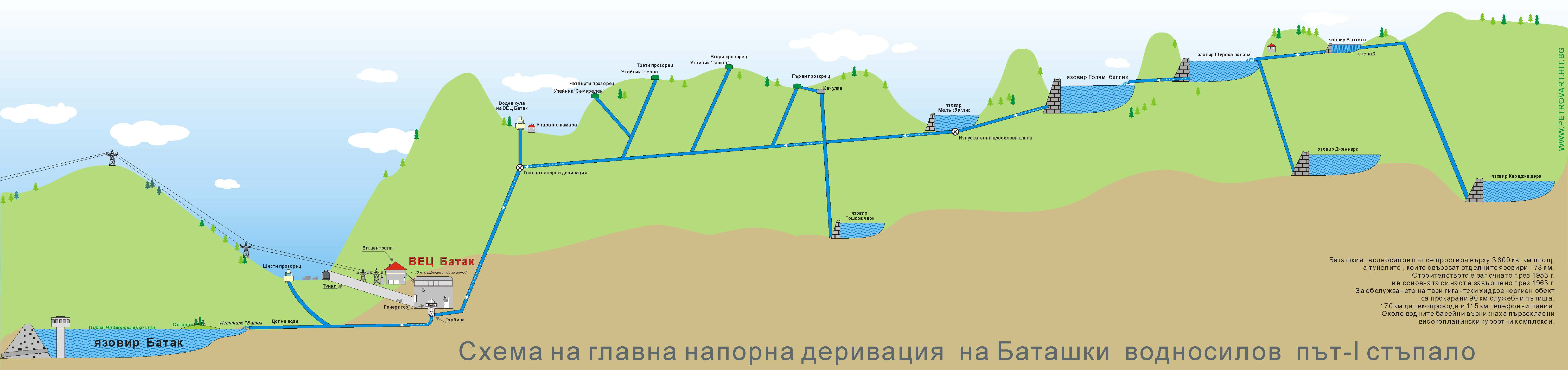 Баташки водносилов път